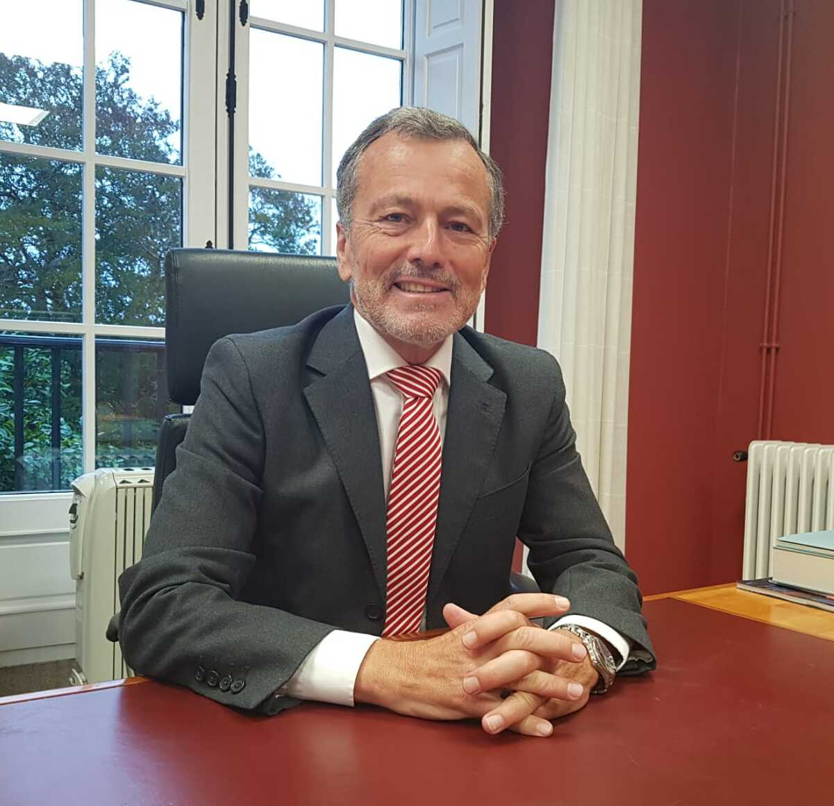 Agustín Hernández en su despacho como Presidente del Consello Económico e Social de Galicia